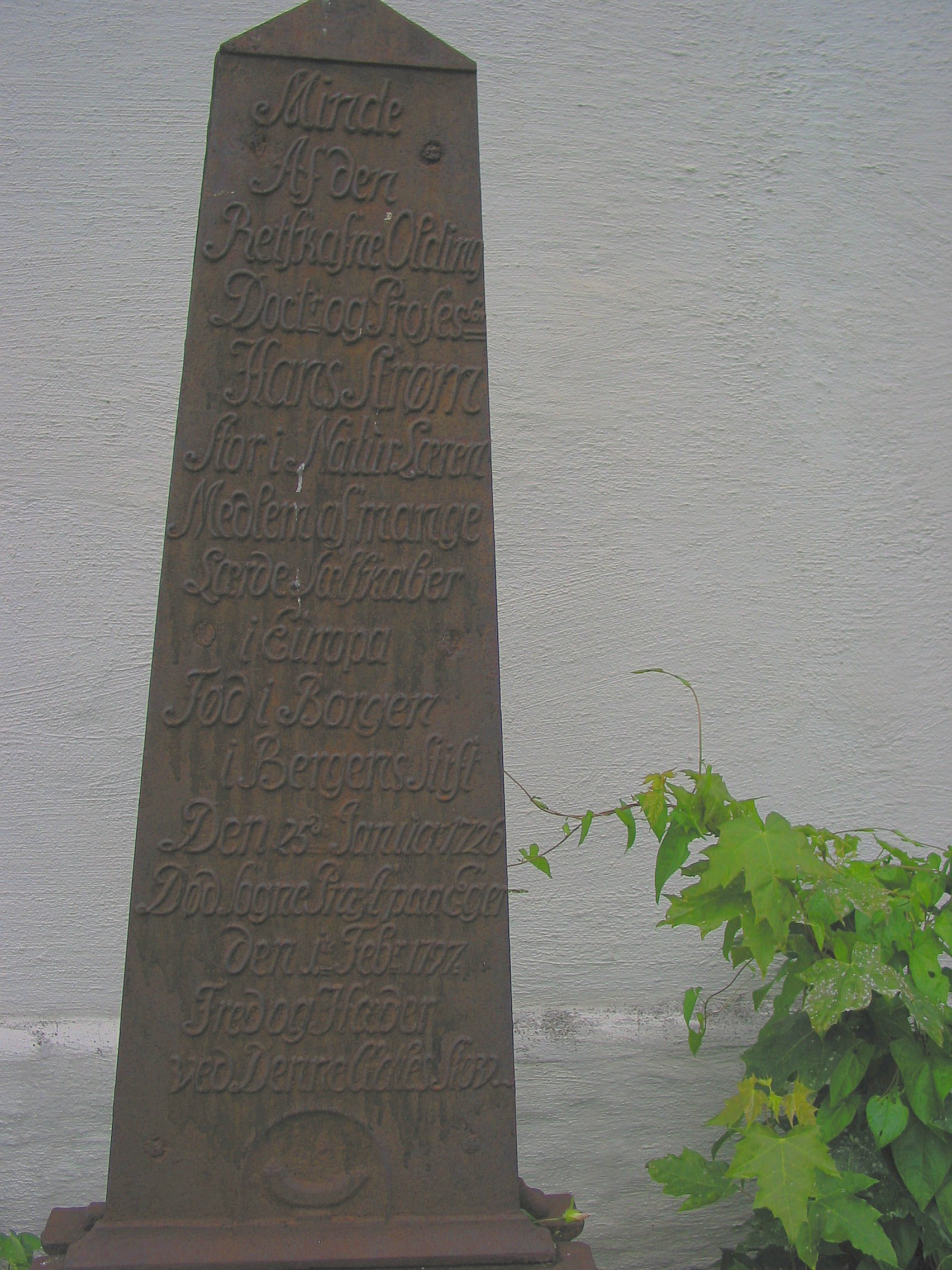 Minnesmerke over Hans Strøm ved Haug Kirke i Øvre Eiker. Fotografert av user:eao